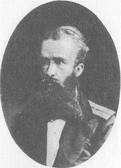 Aleksandr Pavlovič Štromberg (1854-1884)